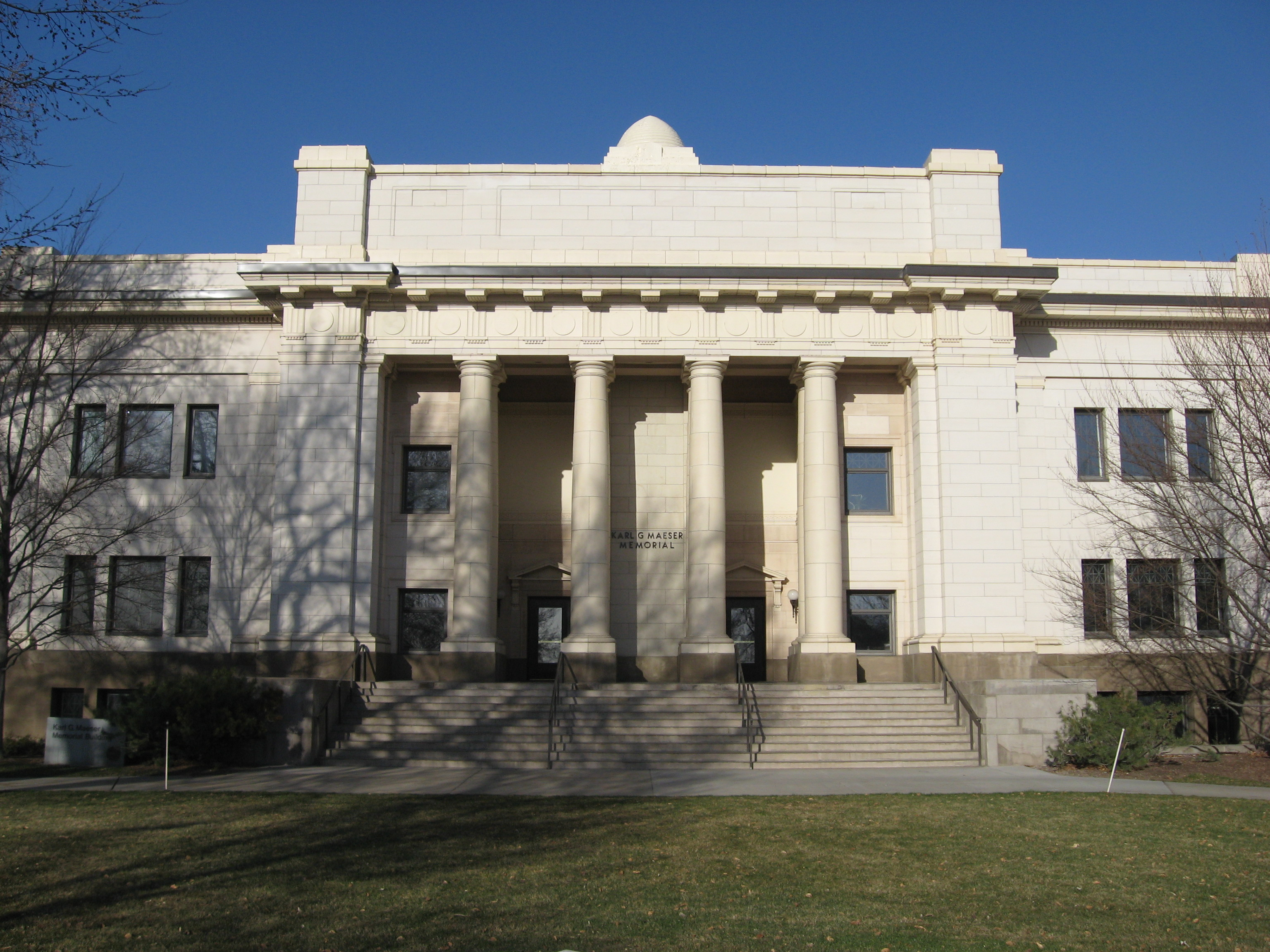 BYU Maeser Building